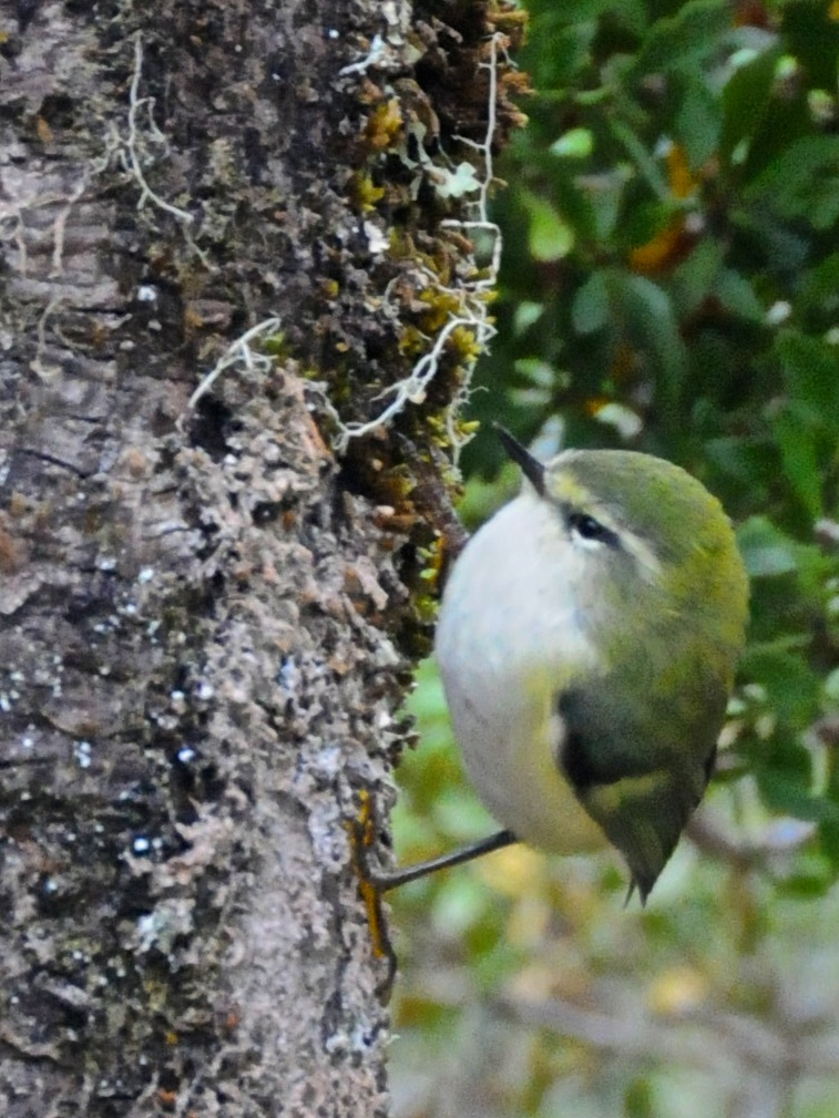 Rifleman